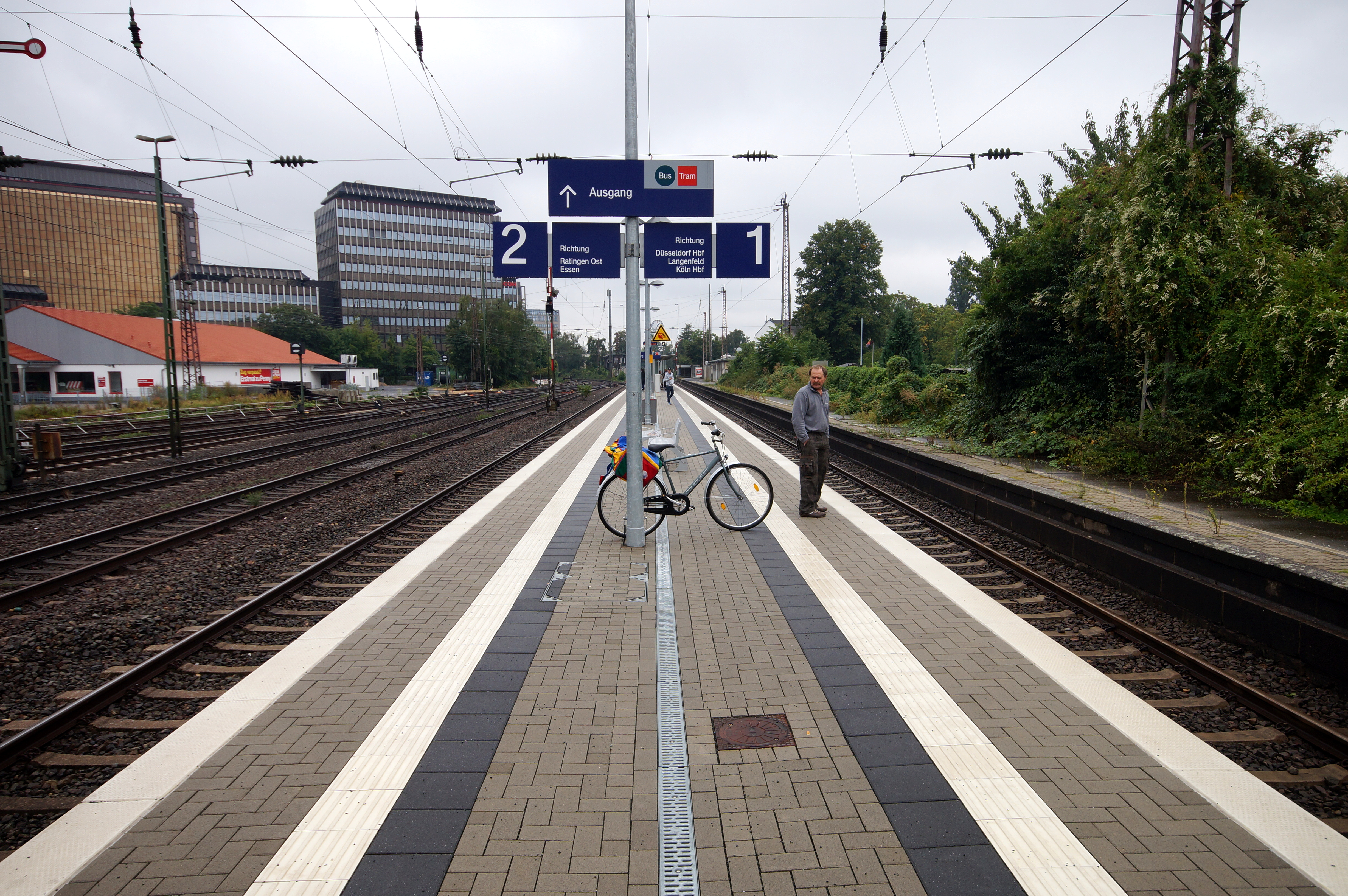 Bahnsteige des Bahnhofs Düsseldorf-Rath